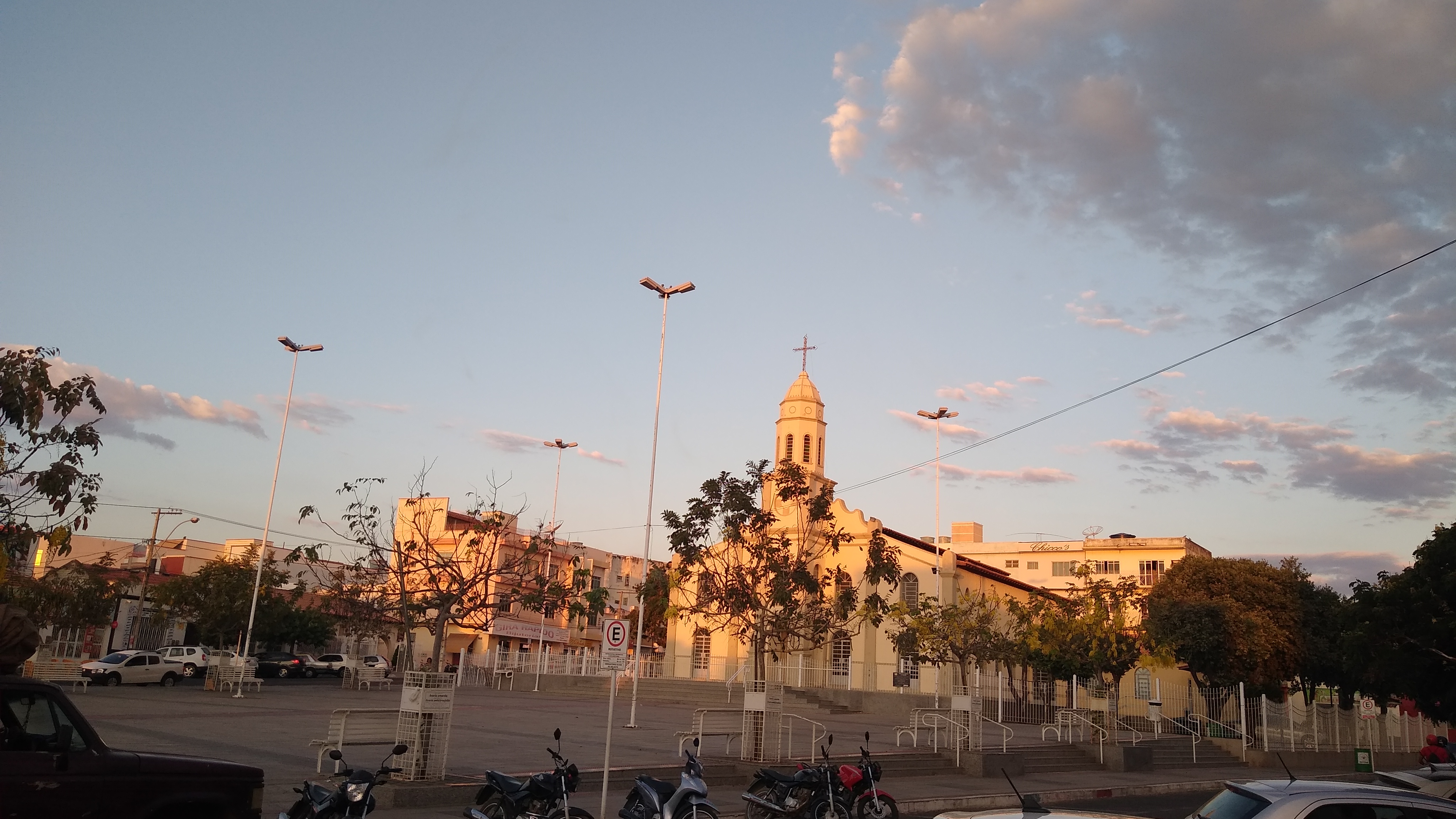 praça da matriz, Guanambi BA